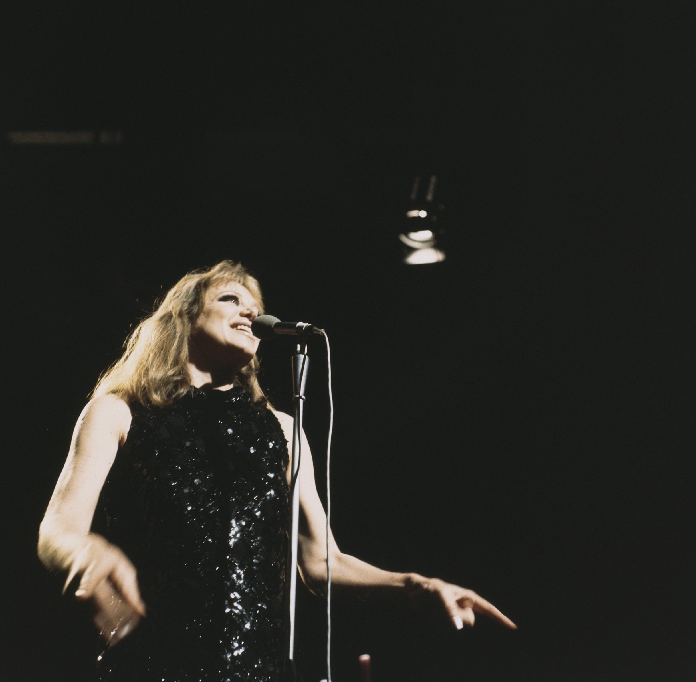 Collectie / Archief : Fotocollectie Anefo Reportage / Serie : Duitse zangeres Hildegard Knef maakt TV-opnamen Beschrijving : Duitse zangeres Hildegard Knef maakt TV opnamen; Hildegard Knef met microfoon Datum : 14 maart 1969 Trefwoorden : microfoons, zangeressen Persoonsnaam : Knef, Hildegard Fotograaf : Koch, Eric / Anefo Auteursrechthebbende : Nationaal Archief Materiaalsoort : Dia (kleur) Nummer archiefinventaris : bekijk toegang 2.24.01.07 Bestanddeelnummer : 254-8442